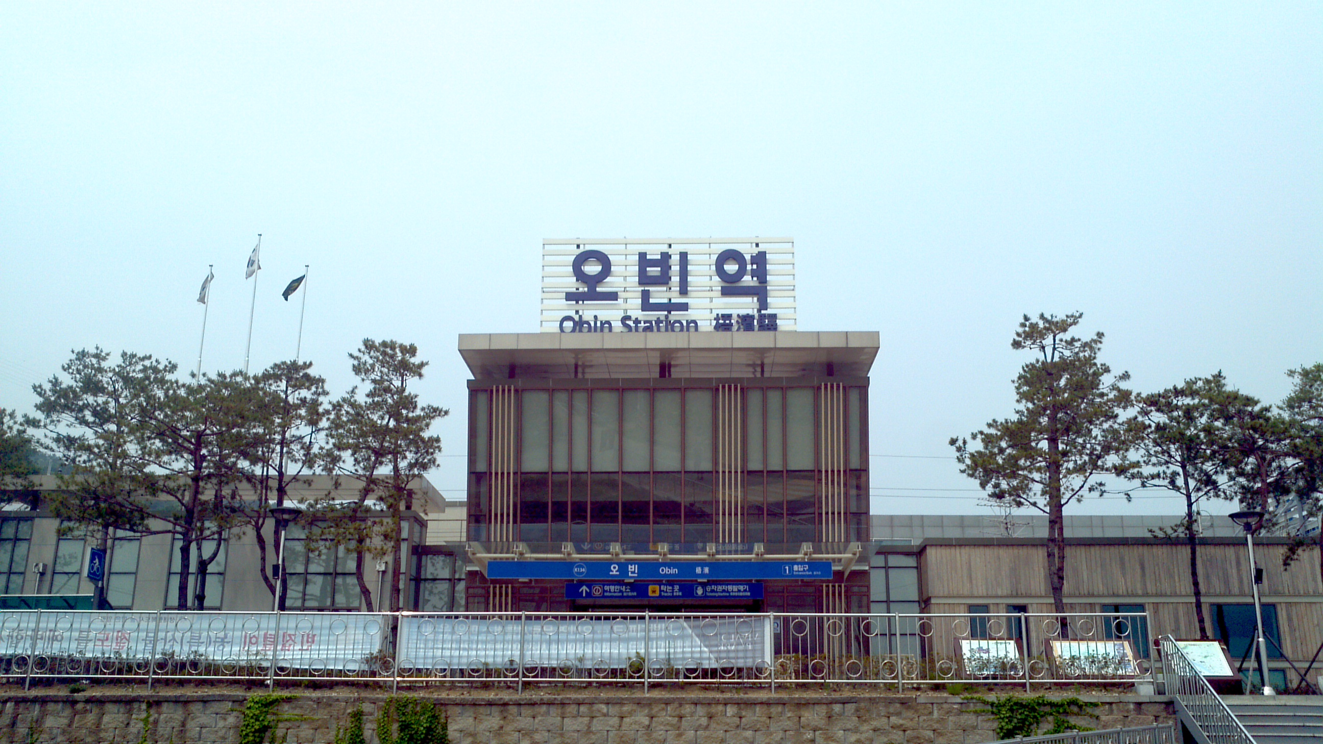 오빈역 역사